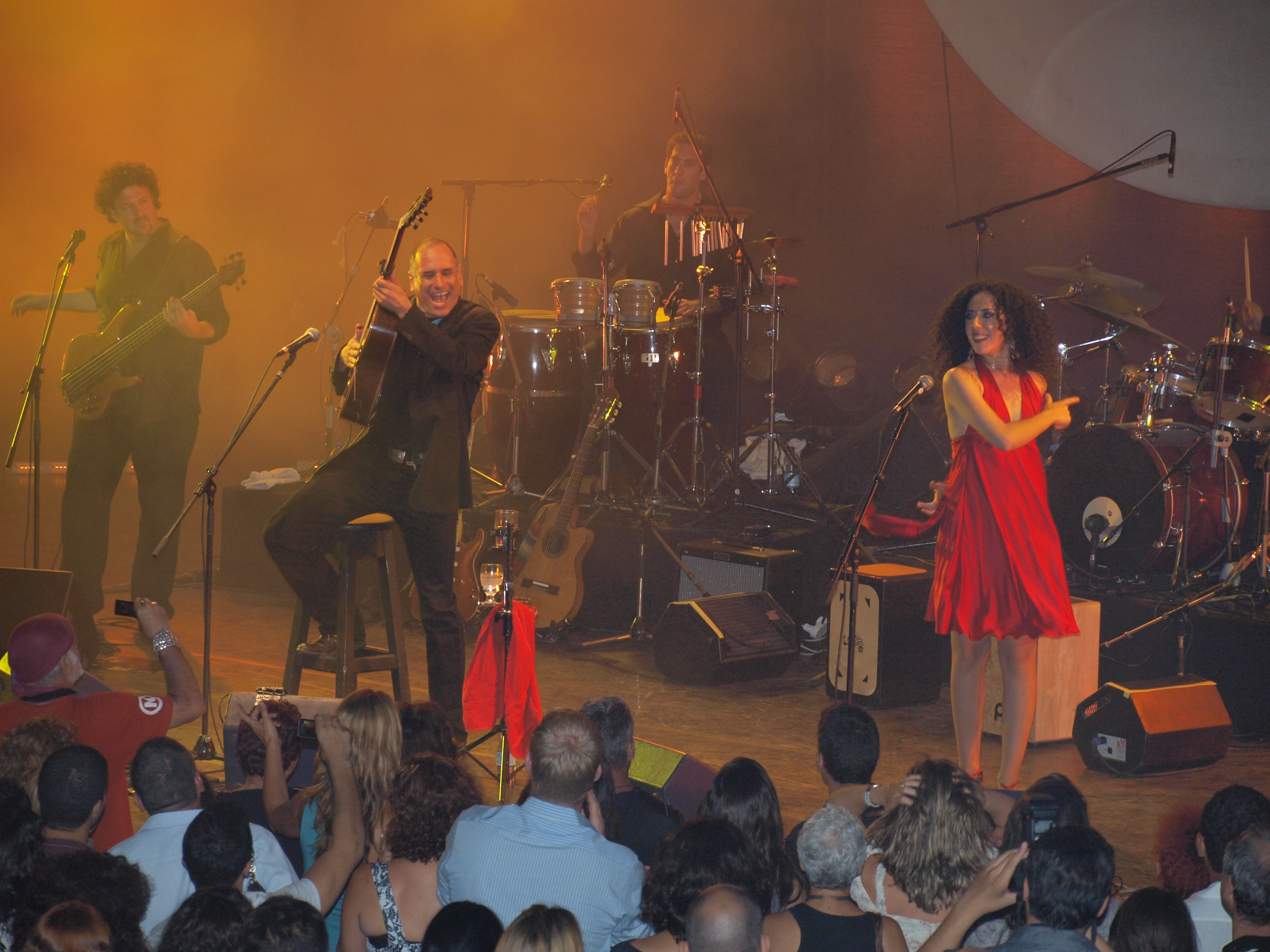 David Broza, Tel Aviv